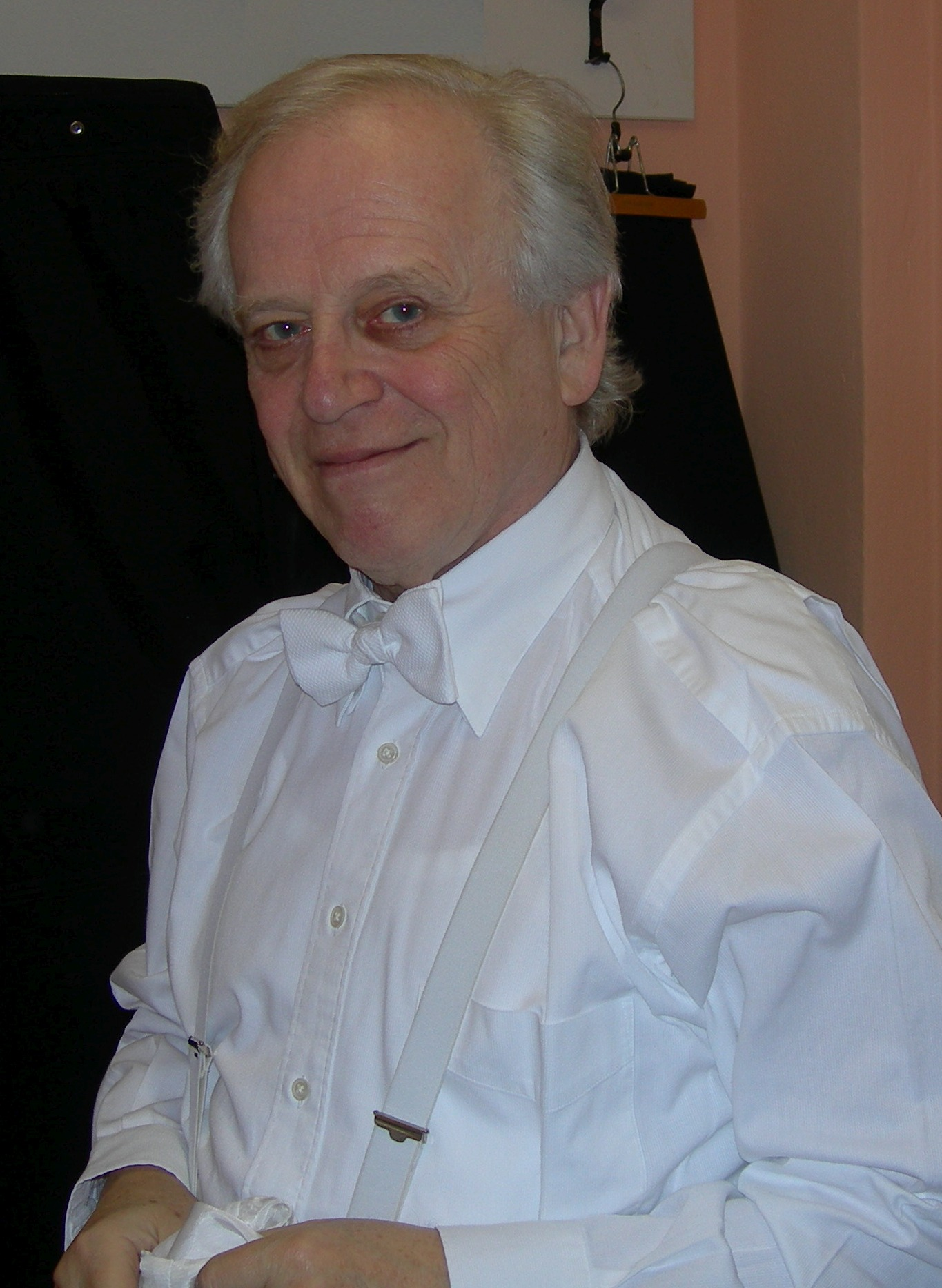 Zoltán Peskó in der Künstlergarderobe nach einem Konzert im Teatro Donizetti, Bergamo, 11. Januar 2006